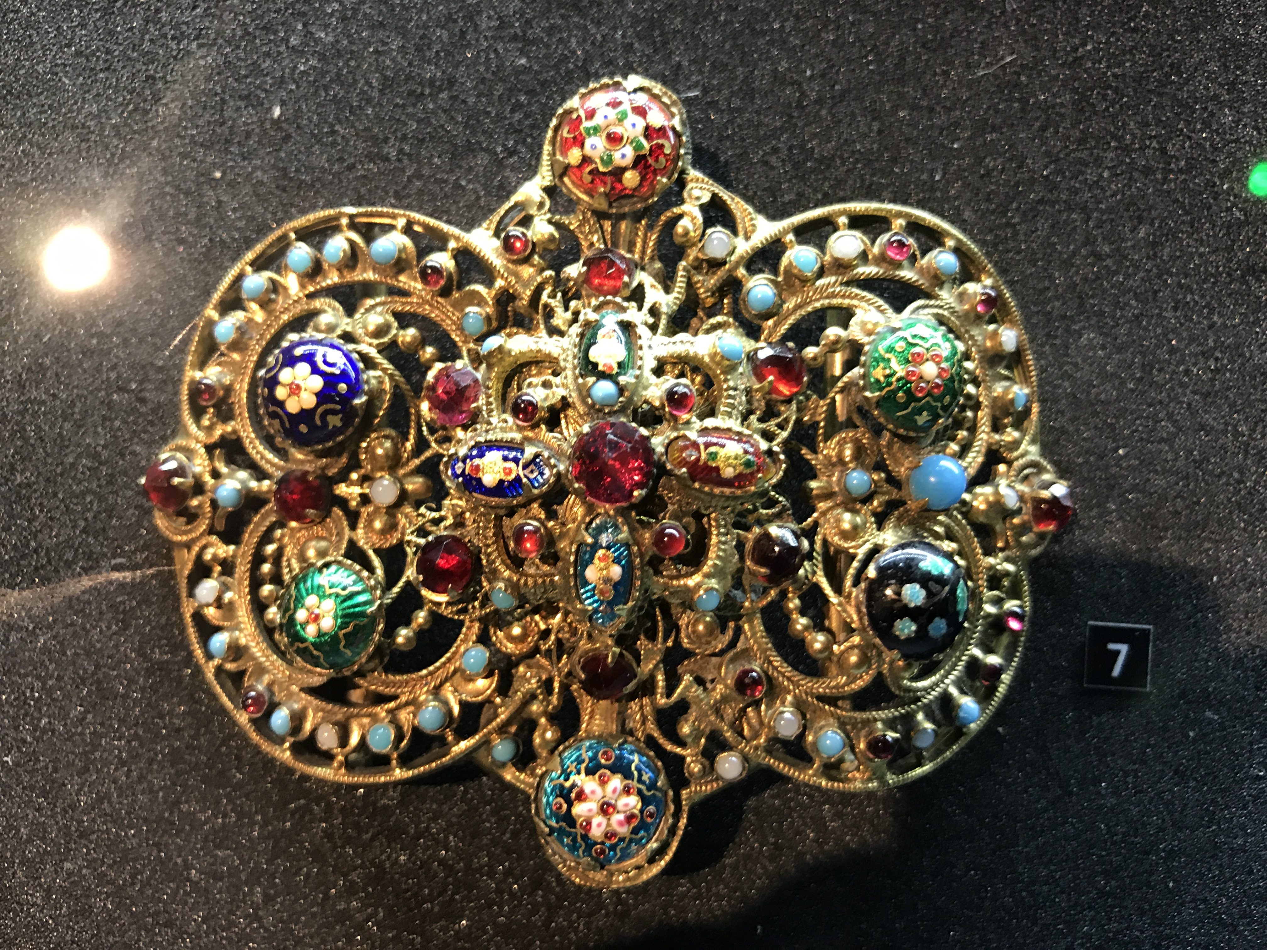 Émaux bressans au musée départemental de la Bresse, Saint-Cyr-sur-Menthon.